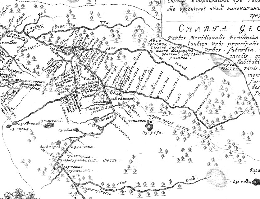 Фрагмент Карты Царства Сибирского Тобольской провинции Тарский уезд